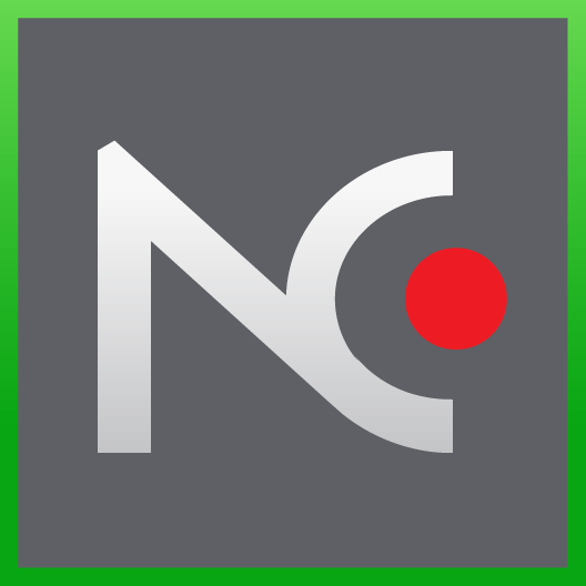 logo NetCrunch